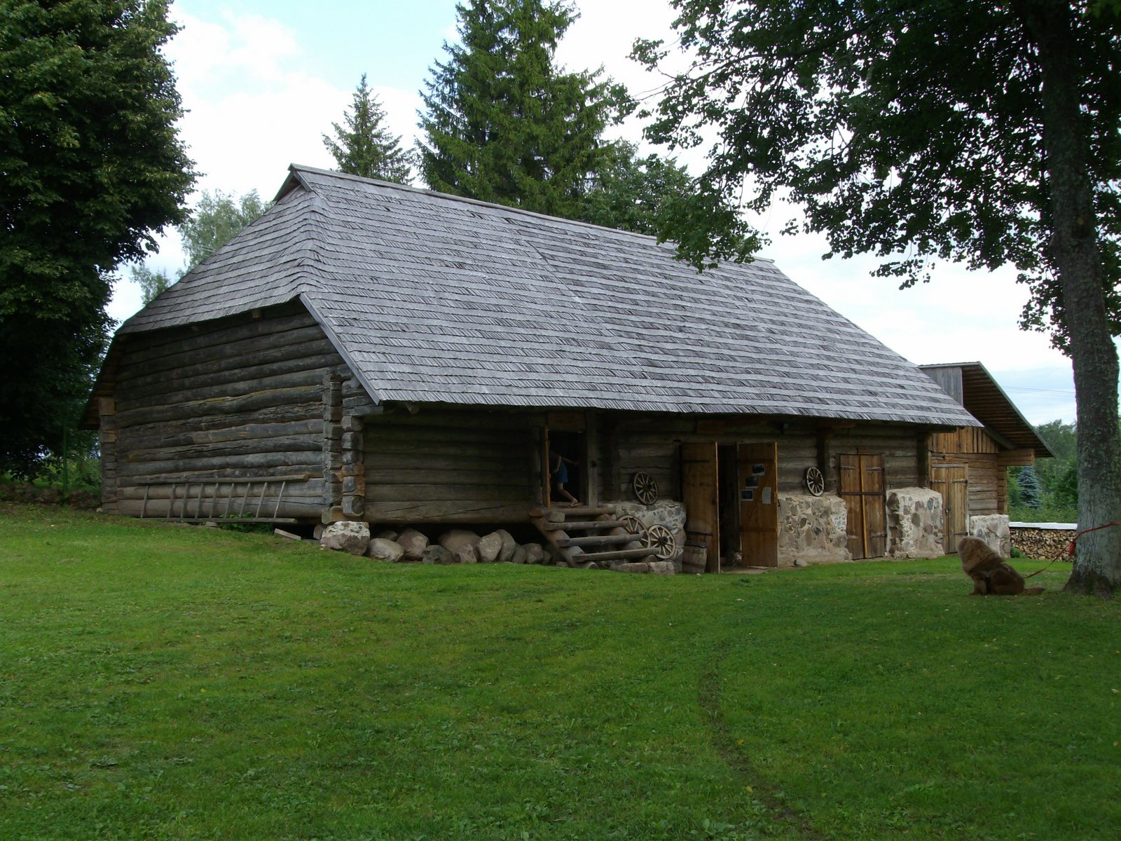 Koolitalu ait-laut Põlva talurahvamuuseumis